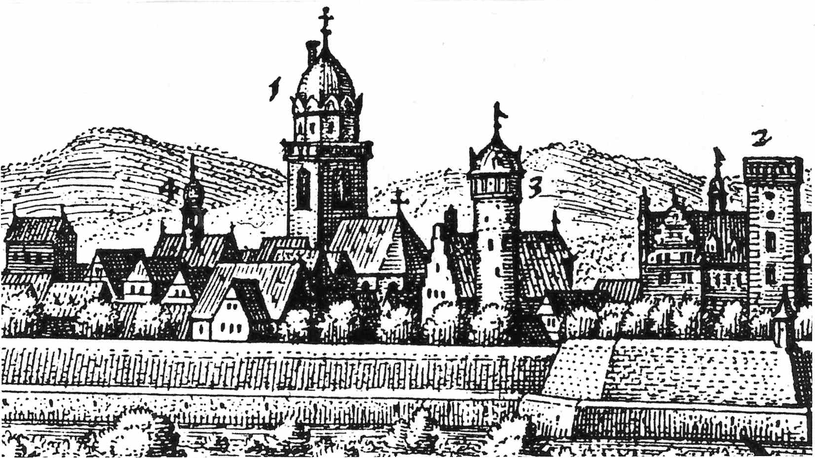 Kupferstich (Ausschnitt) von Gießen, Hessen, Deutschland